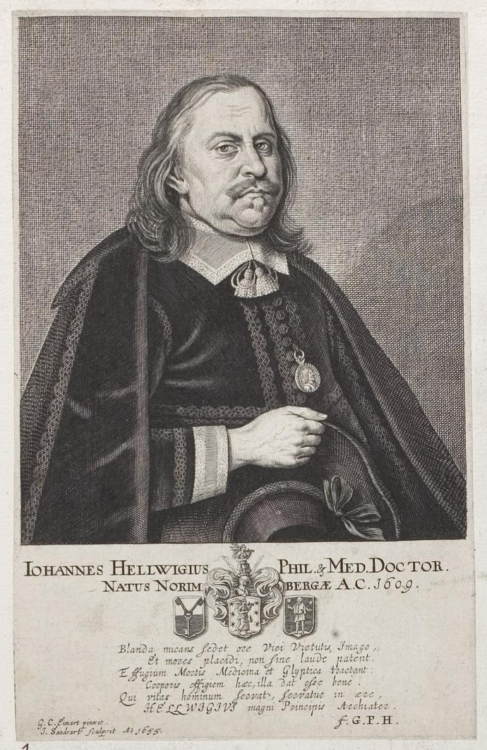 Grafik aus dem Klebeband Nr. 3 der Fürstlich Waldeckschen Hofbibliothek Arolsen Motiv: Johann Helwig (1609–1674), Dichter und Arzt